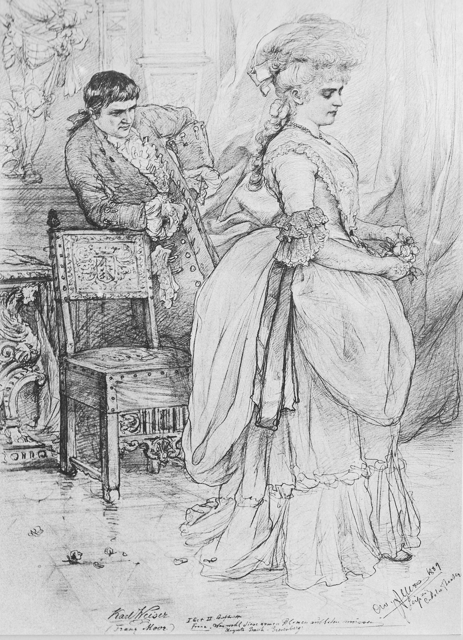 Schauspieler Karl Weiser (1848-1913) und Auguste Prasch-Grevenberg (1854-1945) in Die Räuber am Hoftheater Meiningen